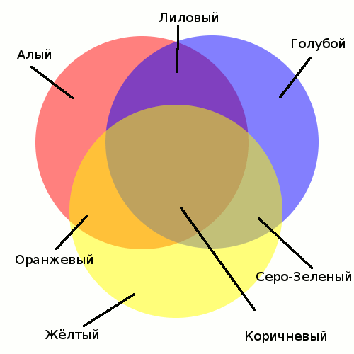 Цвета получаемые при наложении нескольких цветов друг на друга